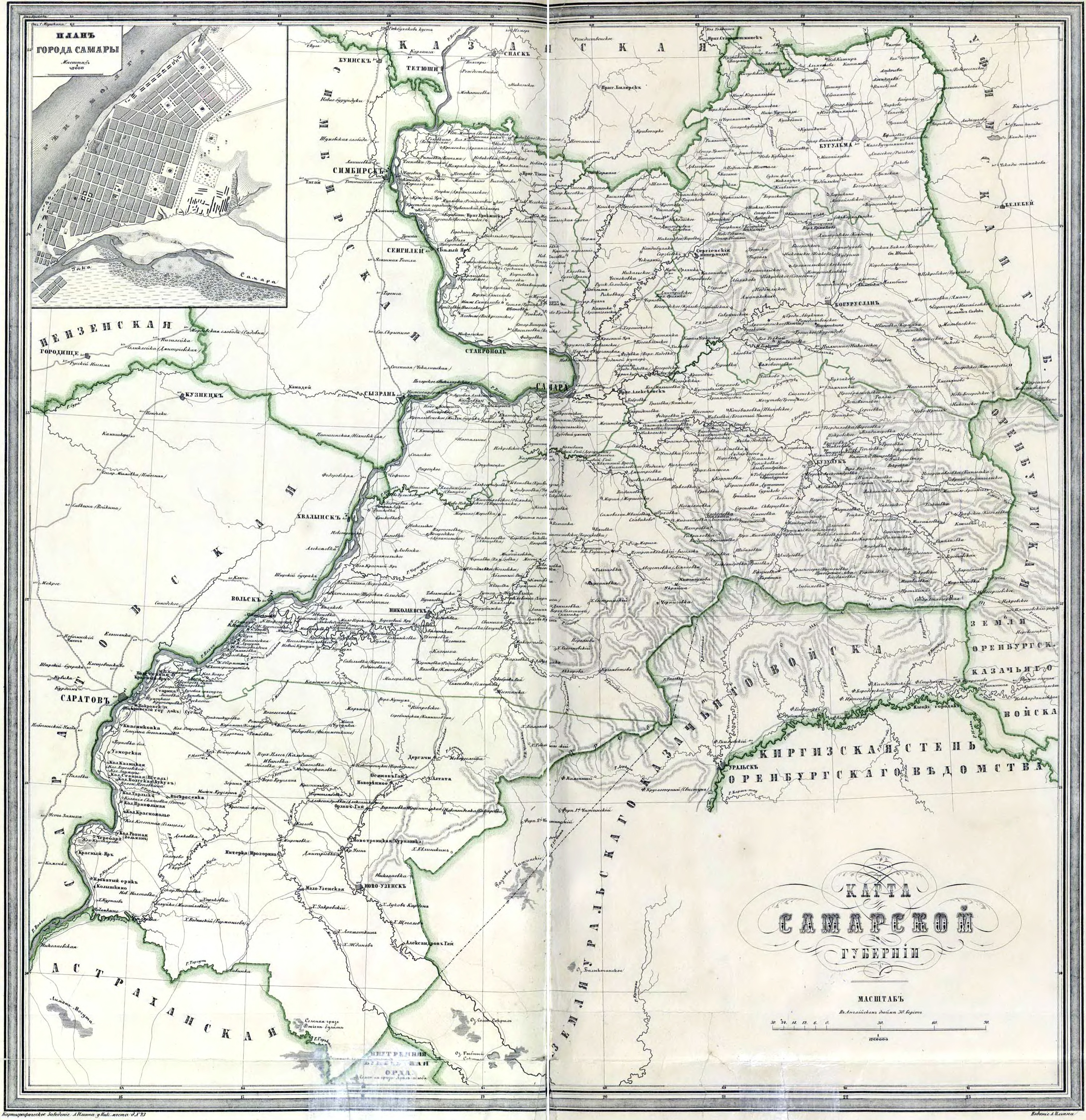 Карта Самарской губернии